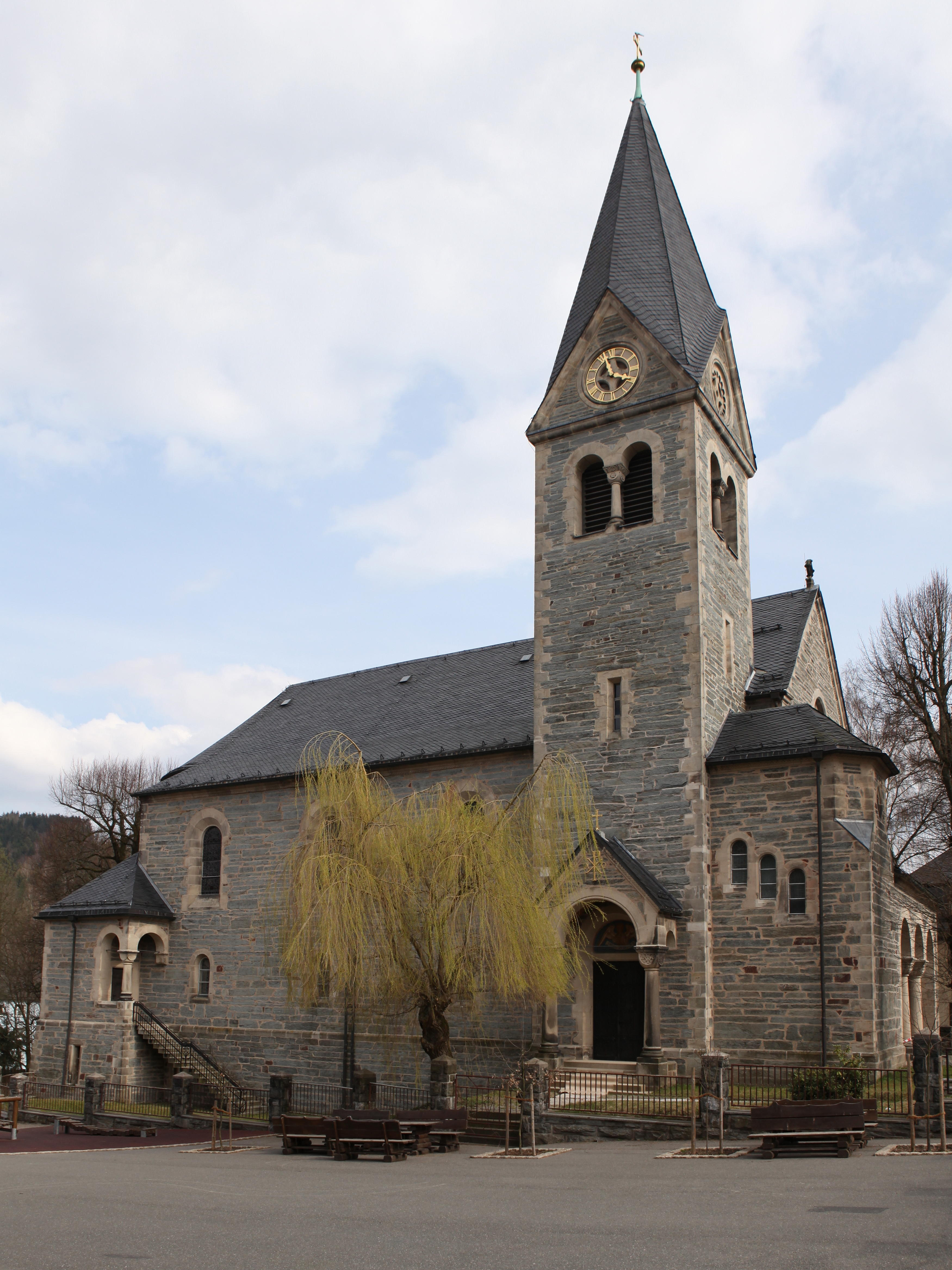 Ev.-luth. Kirche St. Peter und Paul in Steinach in Thüringen